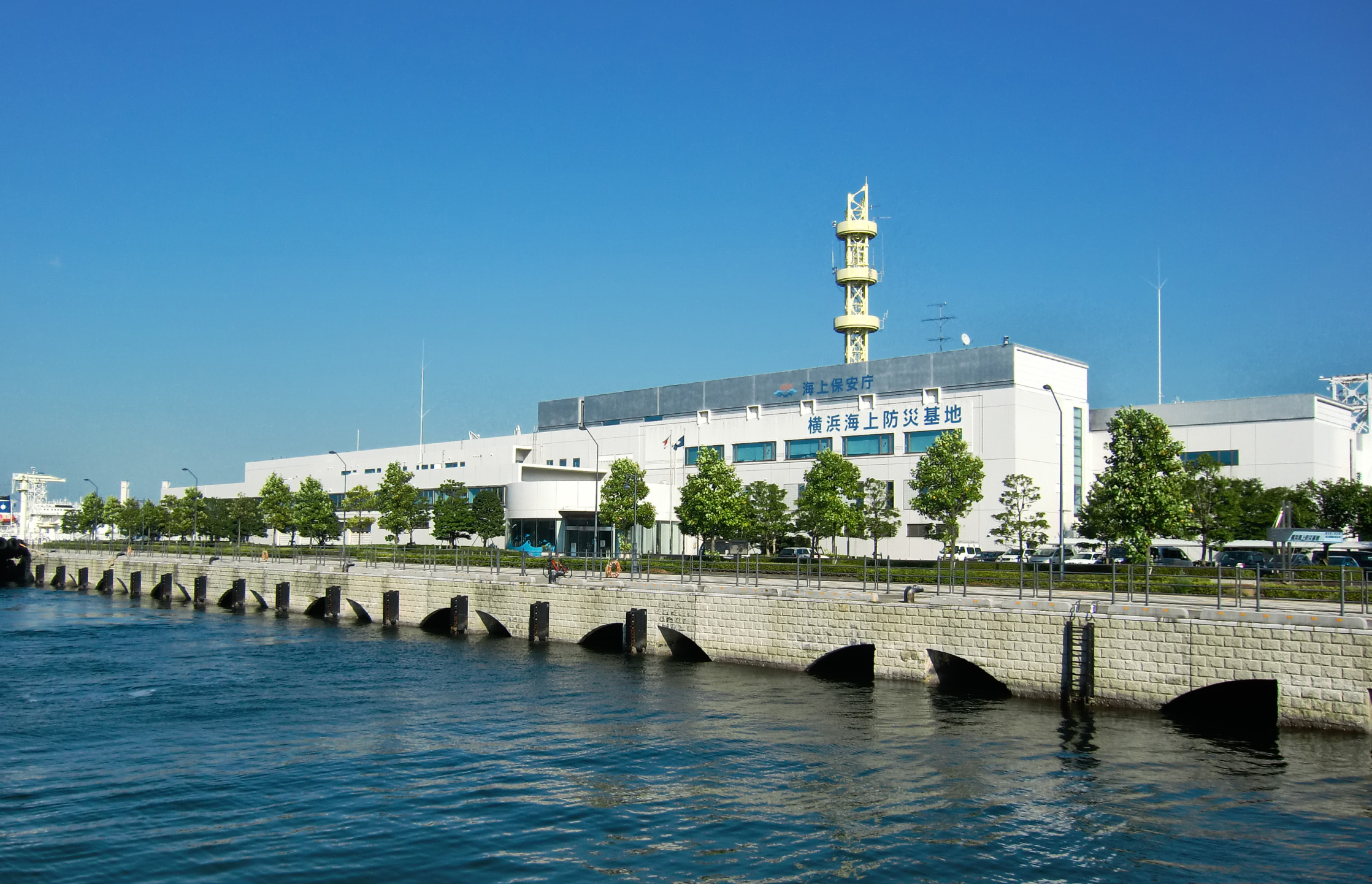 横浜海上防災基地（投稿者にて撮影）